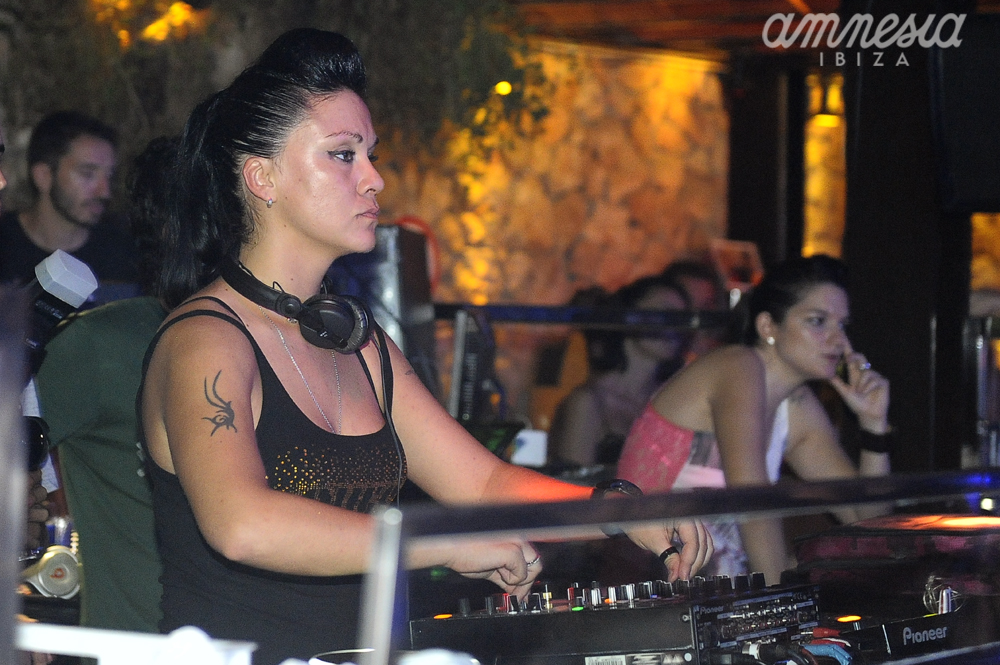 14.07.12 - Matinée. More pics at